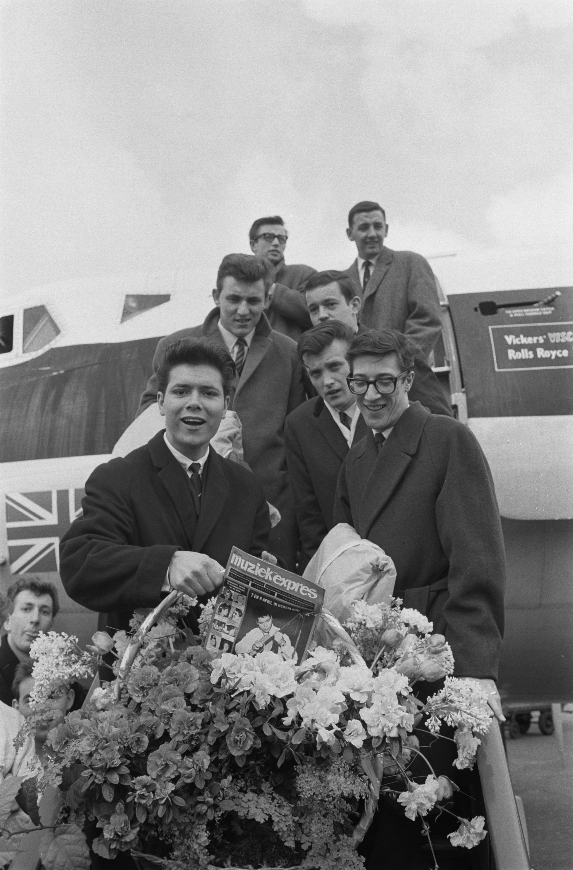 Collectie / Archief : Fotocollectie Anefo Reportage / Serie : [ onbekend ] Beschrijving : Cliff Richard met zijn Shadows op Schiphol Datum : 6 april 1962 Locatie : Noord-Holland, Schiphol Trefwoorden : artiesten, groepen, muziek Persoonsnaam : Richard, Cliff Instellingsnaam : Shadows, The Fotograaf : Pot, Harry / Anefo Auteursrechthebbende : Nationaal Archief Materiaalsoort : Negatief (zwart/wit) Nummer archiefinventaris : bekijk toegang 2.24.01.05 Bestanddeelnummer : 913-7394